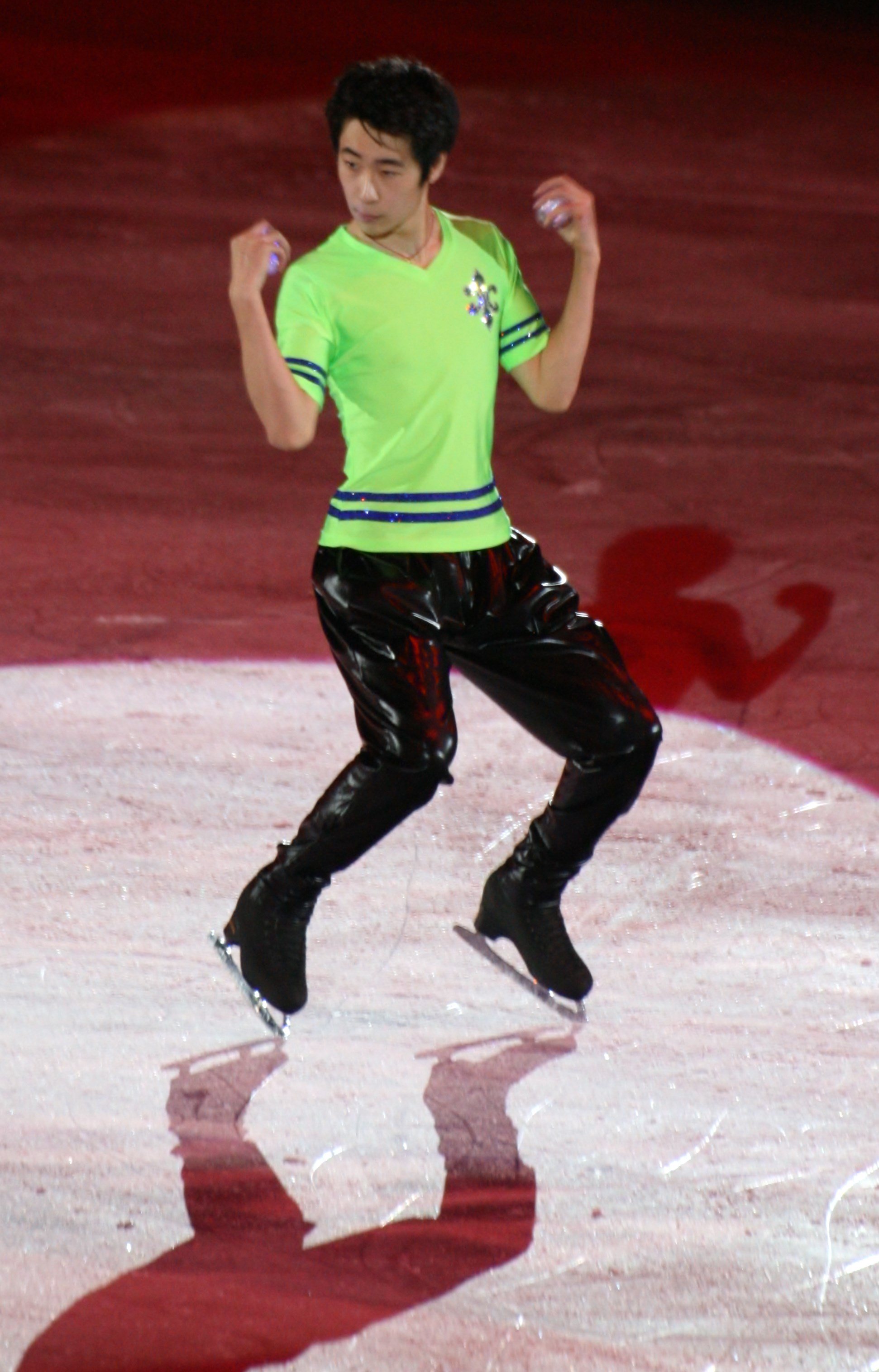 Цзинь Боян (Китай) на показательных выступлениях в финале Гран-при по фигурному катанию 2015-2016.